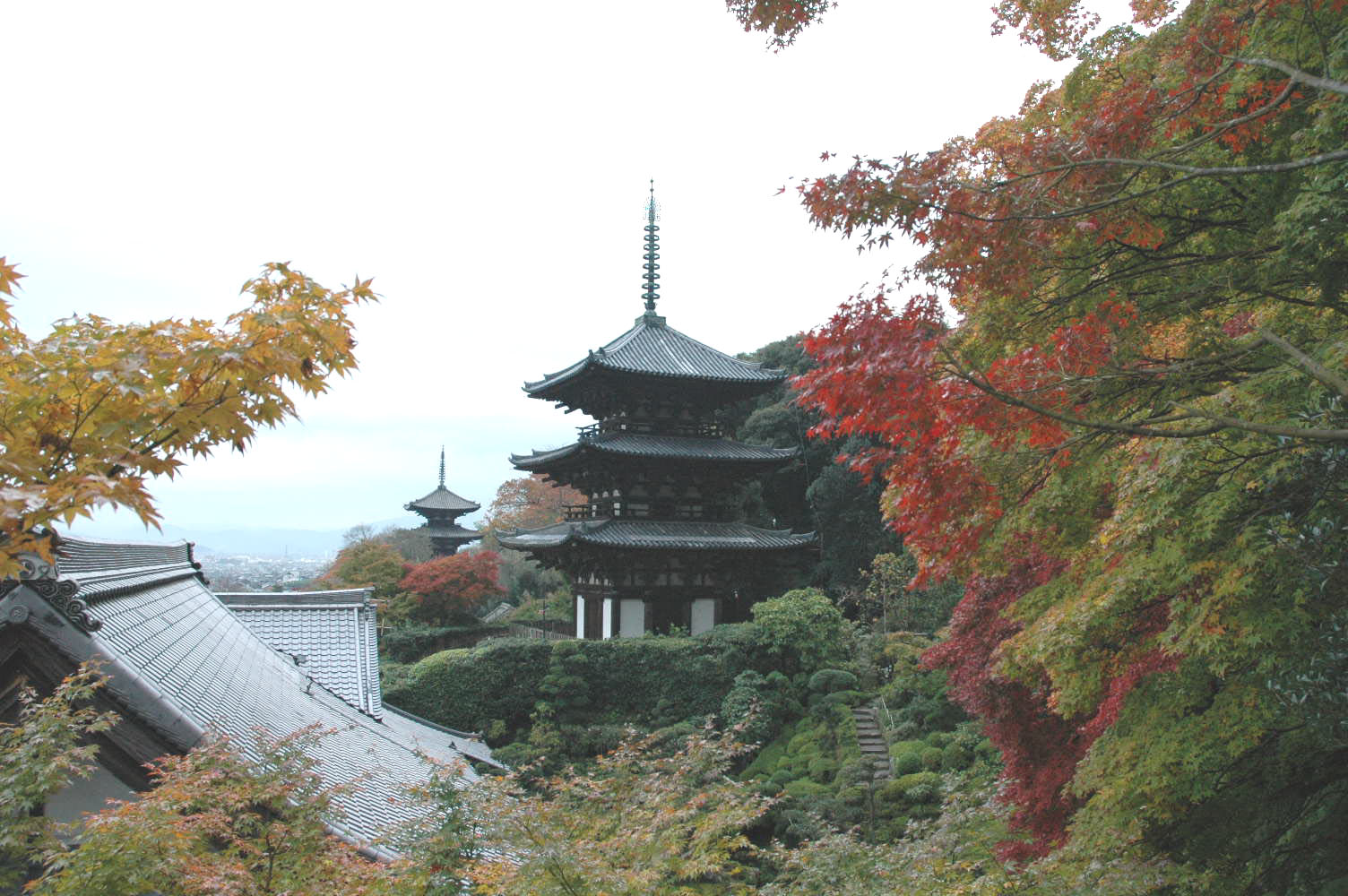 Taima-dera (Temple) in Katsuragi city, Nara, Japan